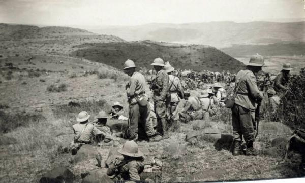 I militari giunti sul costone di Dausà, si concedono una sosta in piedi o seduti.